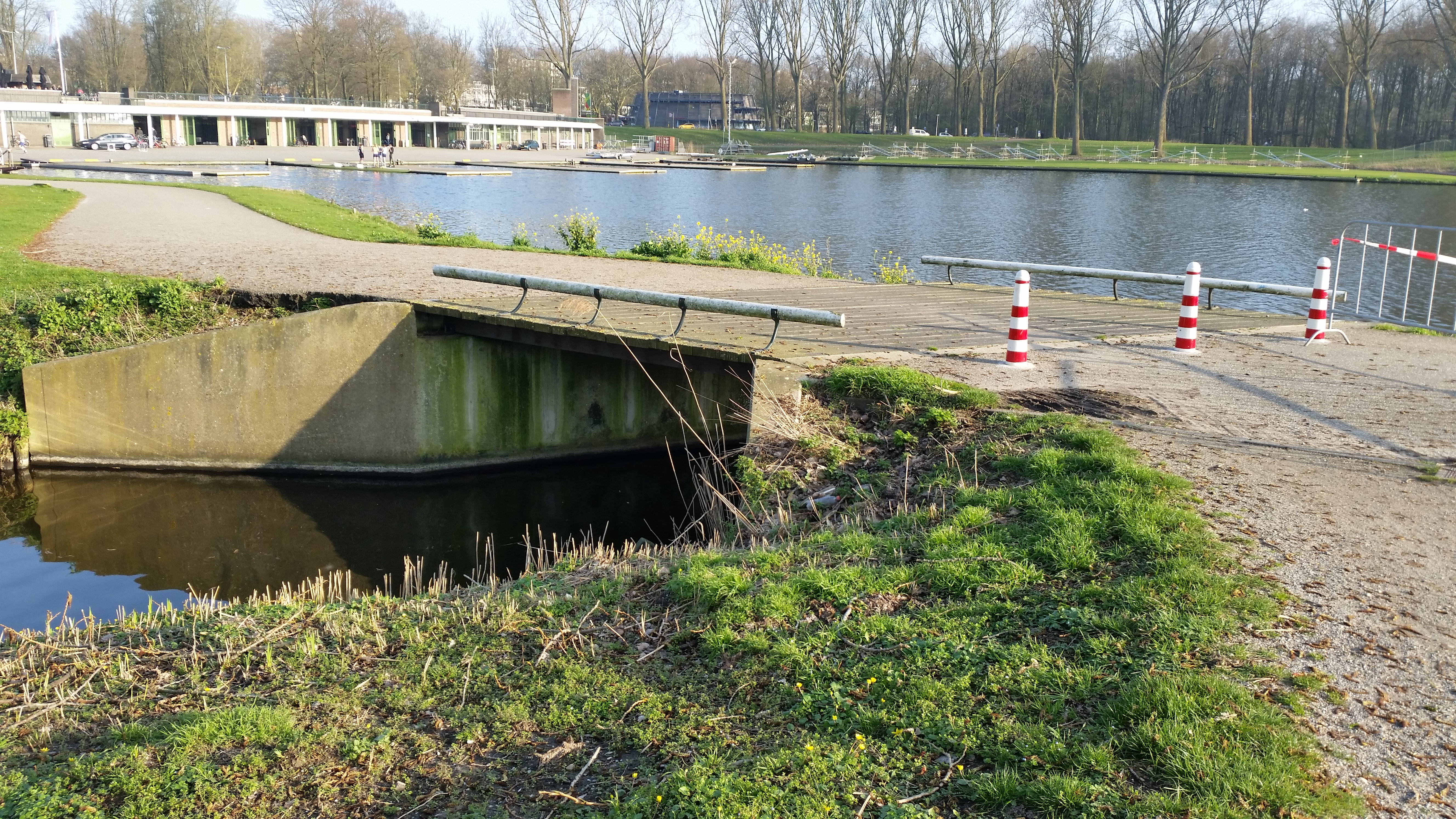 Zijaanzicht van Brug 509 (in Amsterdam) met op de achtergrond het botenhuis